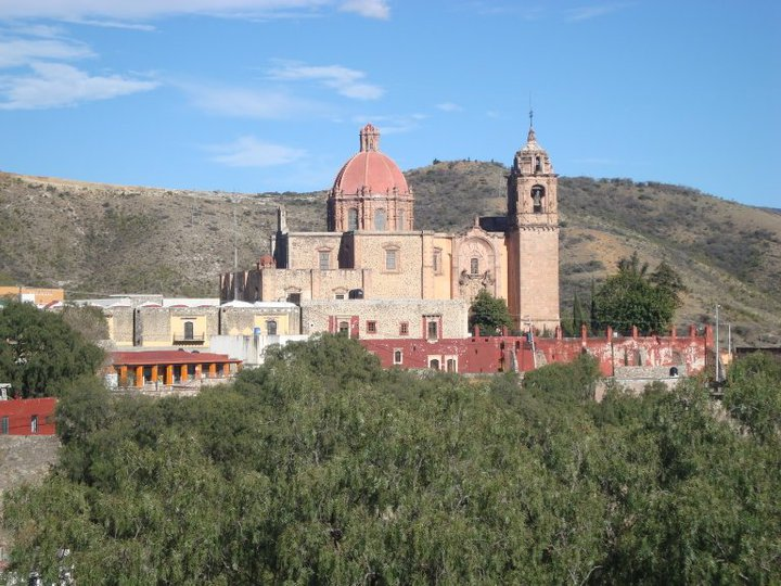 Ex Convento de San Cayetano